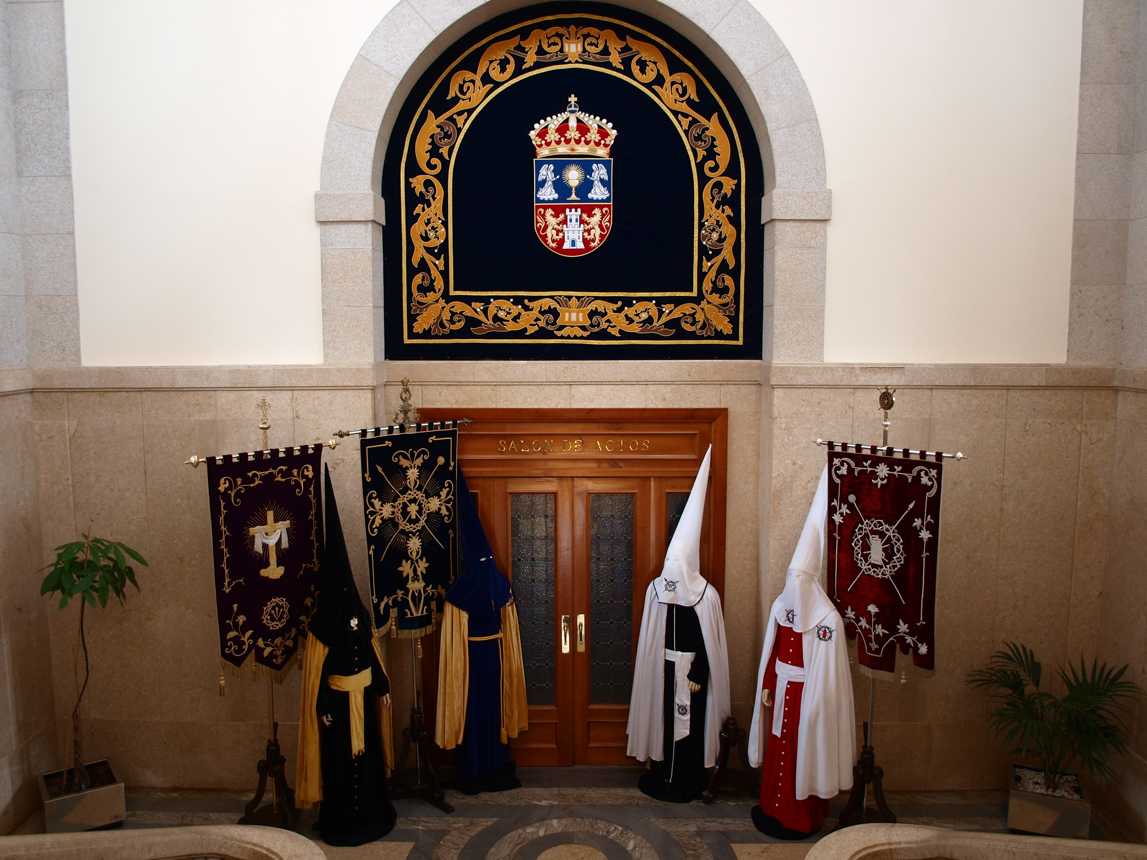 Presentación de la semana santa de Viveiro 2011